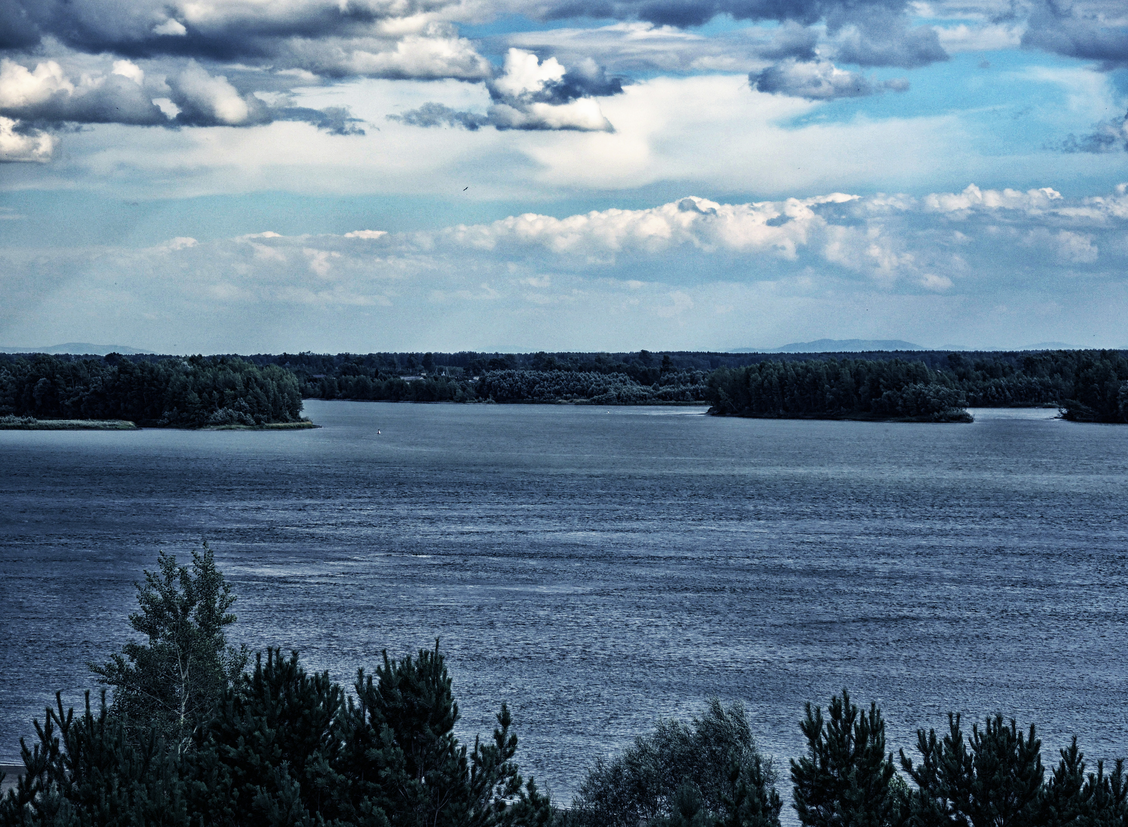 Слияние Бии и Катуни (Остров Иконников): В месте слияния р. Бии и р. Катуни. Географическое: остров Иконников расположен в месте слияния р. Бии и Катуни. Координаты: 52 град. 28 мин. 25,10 сек. с.ш. 85 град. 06 мин. 21,55 сек. в.д., 52 град. 25 мин. 43,93 сек. с.ш. 85 град. 04 мин. 52,35 сек. в.д., 52 град. 25 мин. 40,14 сек. с.ш. 85 град. 01 мин. 22,12 сек. в.д., 52 град. 27 мин. 31,73 сек. с.ш. 85 град. 04 мин. 20,72 сек. в.д,Смоленский район, Алтайский край This image is related to the protected area of Russia number 2210137